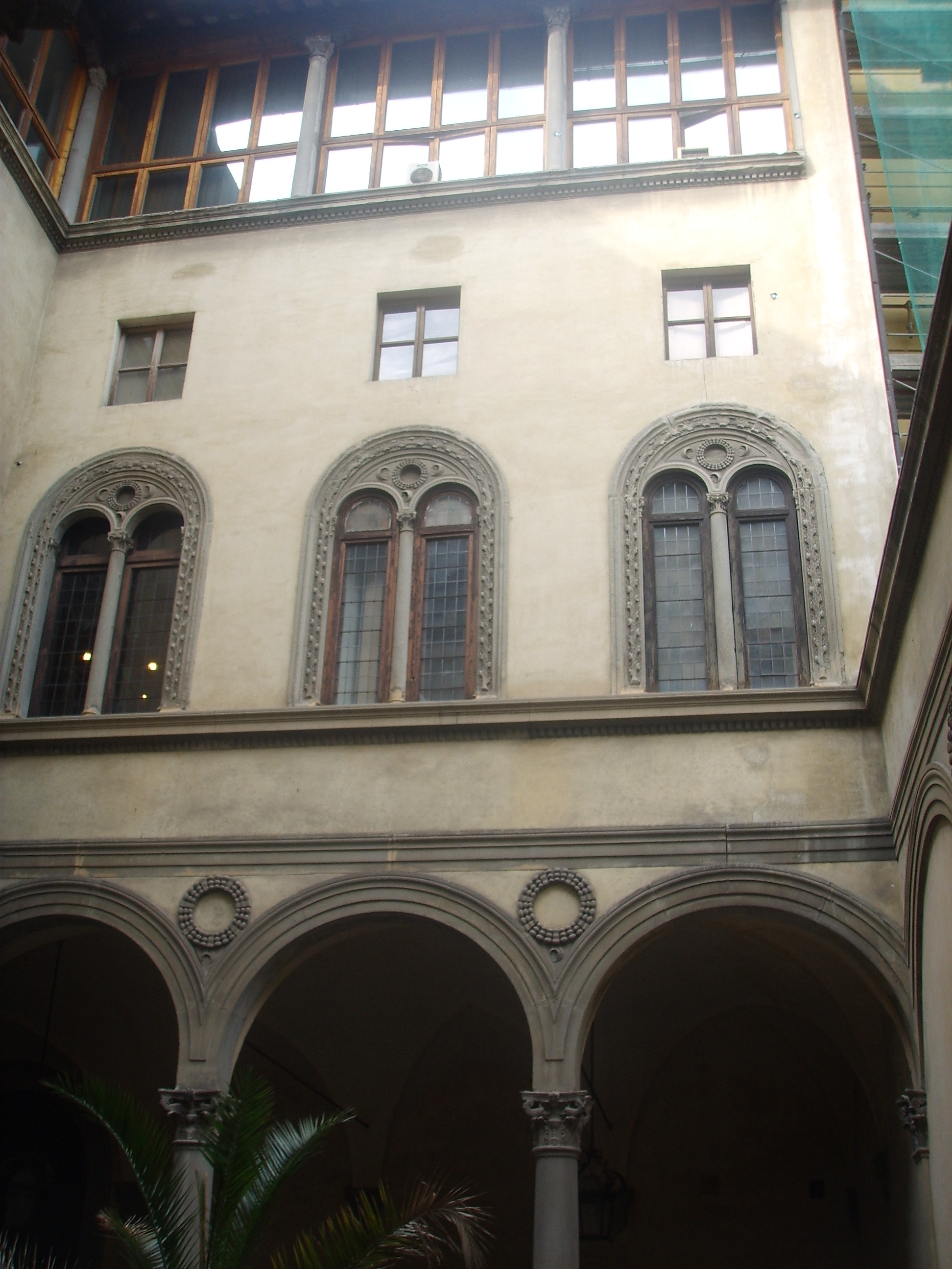 Palazzo Pazzi. Windows. in Florence, Italy